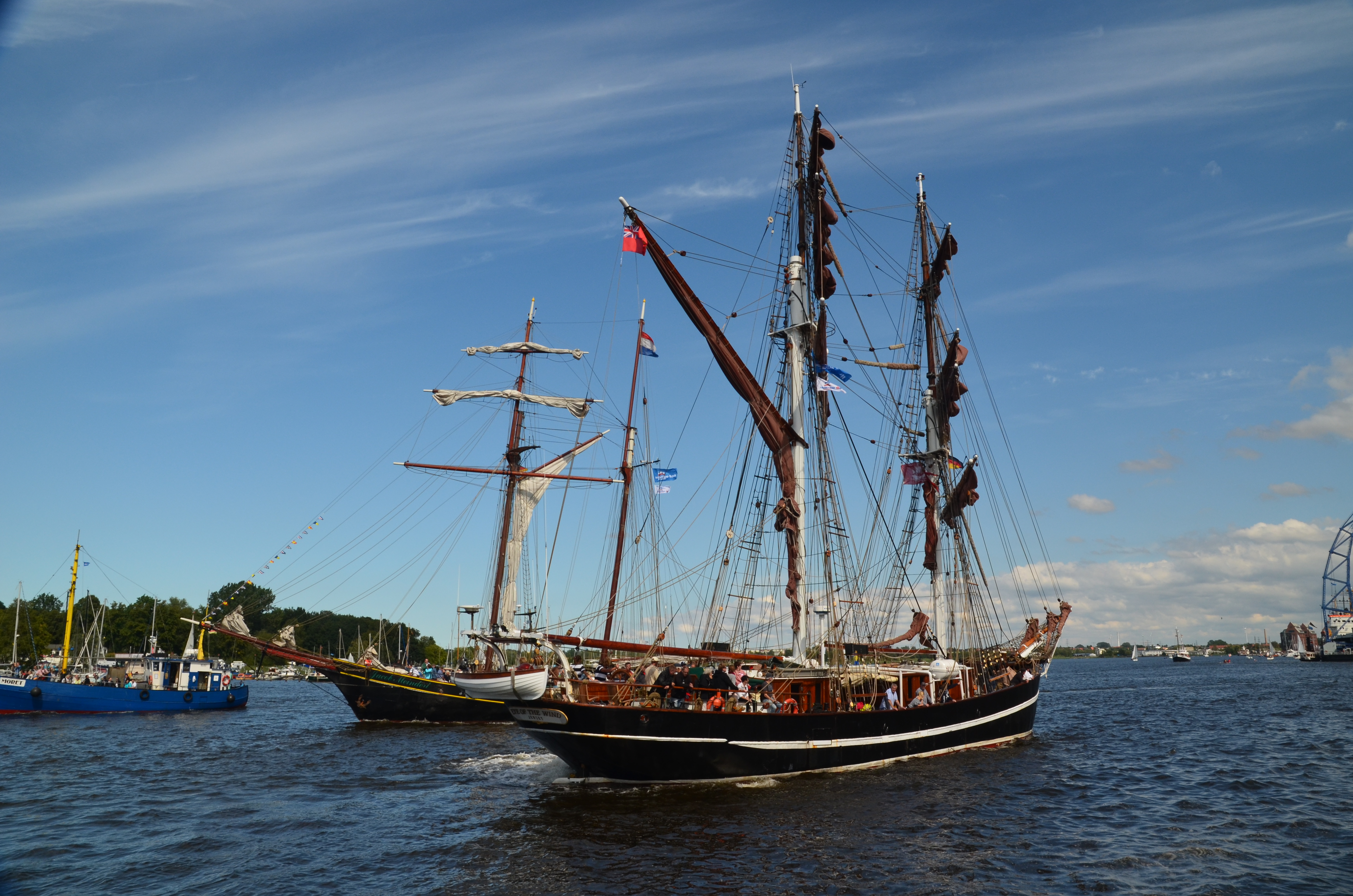 Impressionen von der 22. Hansesail 2012